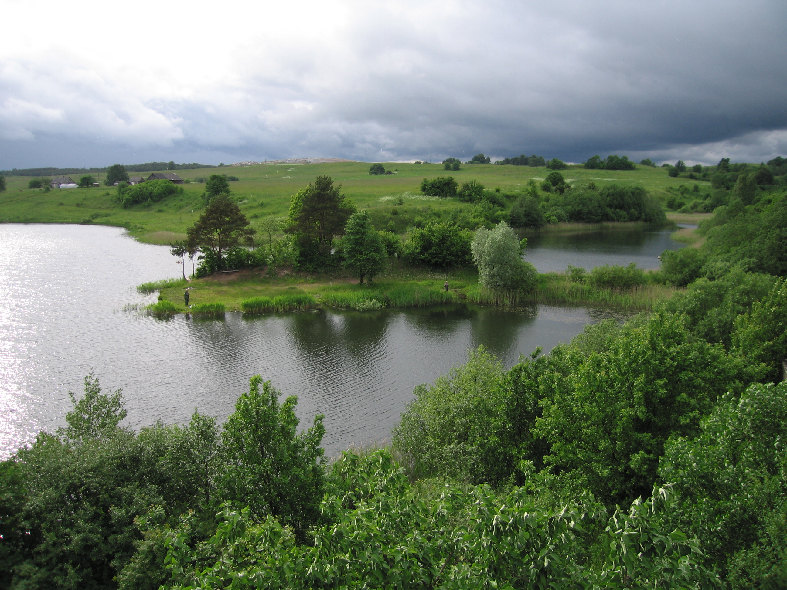 Lepšiškių kaimo (Kauno raj.) peizažas